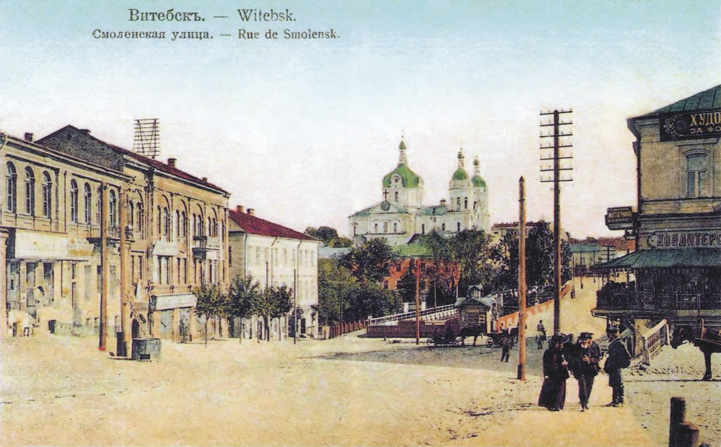 Беларуская (тарашкевіца): Віцебск (Viciebsk), рог вуліц Вялікай (vulica Vialikaja) і Падзьвінскай (vulica Padźvinskaja)